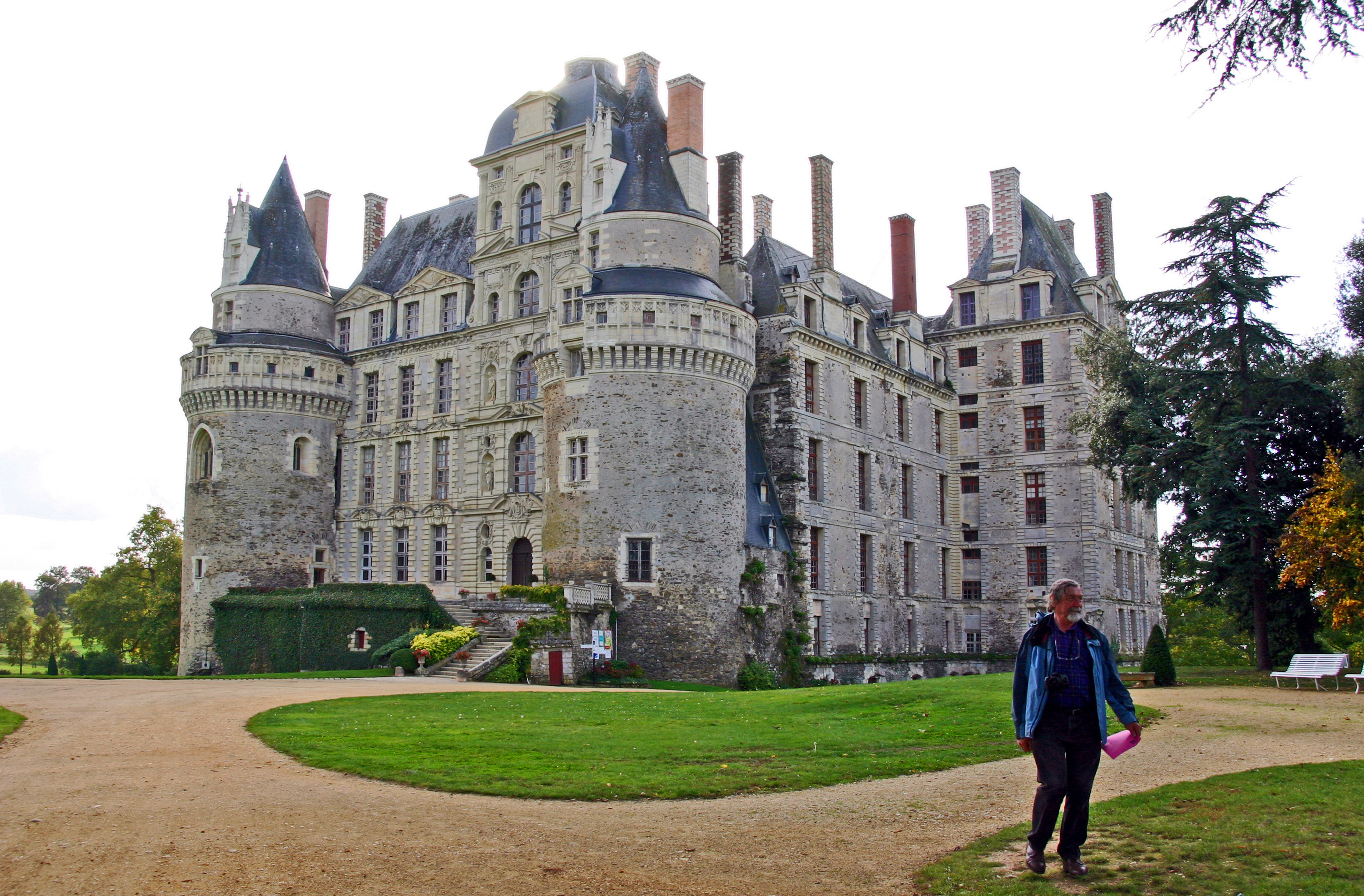 Schloss Brissac